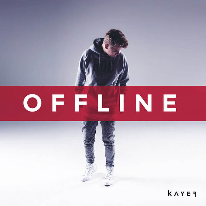 Cover der EP „Offline“